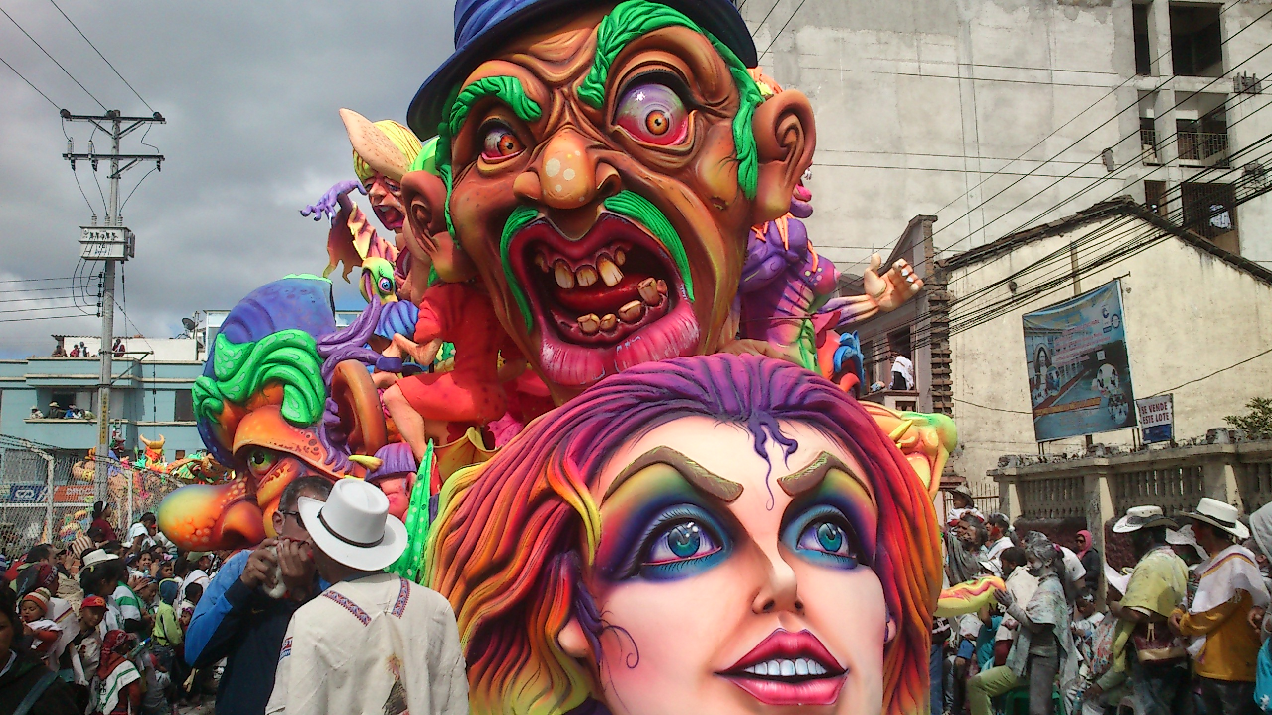 esta fotografía, representa el magno carnaval multicolor de la frontera en ipiales, nariño el día 6 de enero de 2013